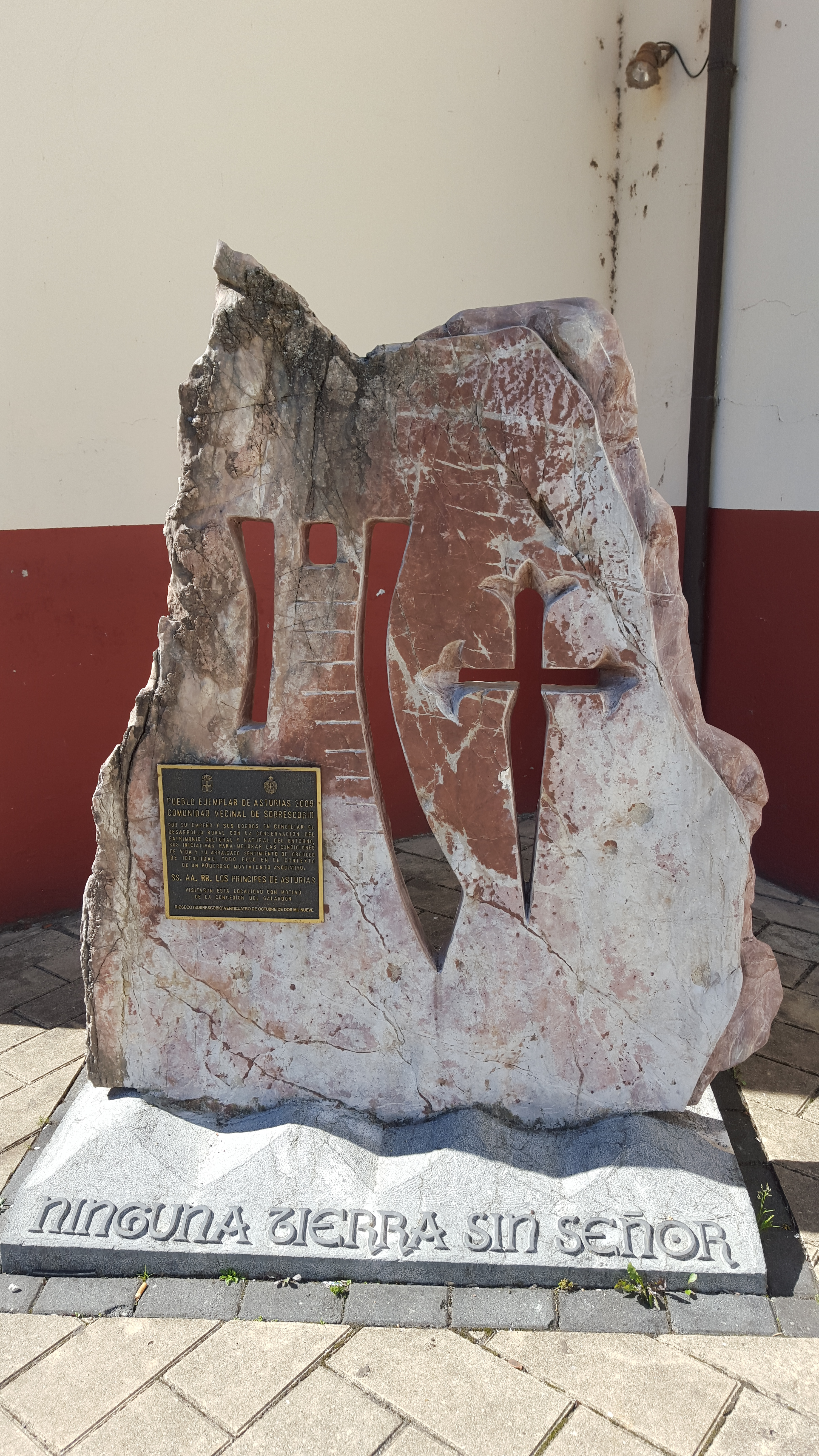 Rioseco, Premio Príncipe de Asturias Pueblo ejemplar 2009